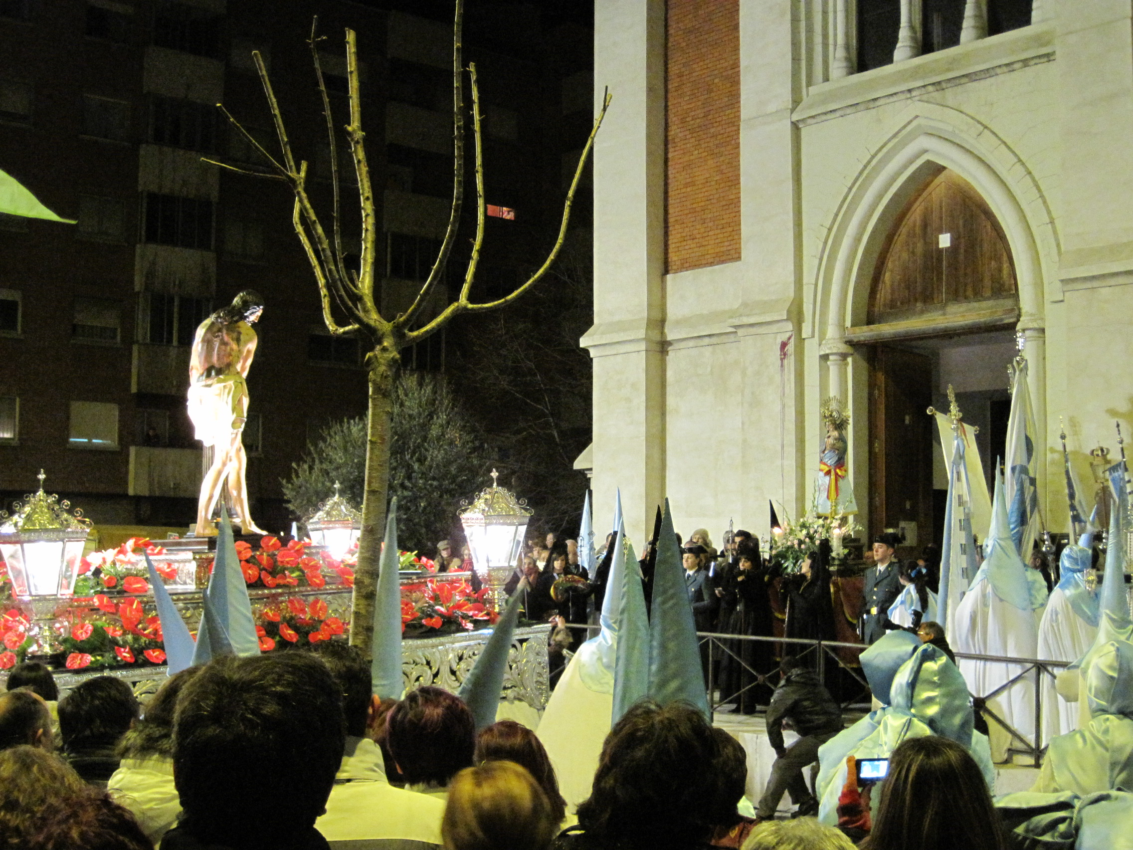 Encuentro de El Señor Atado a la Columna y Nuestra Señora del Pilar durante la procesión de la Peregrinación de la Promesa. Martes Santo. Valladolid (España).